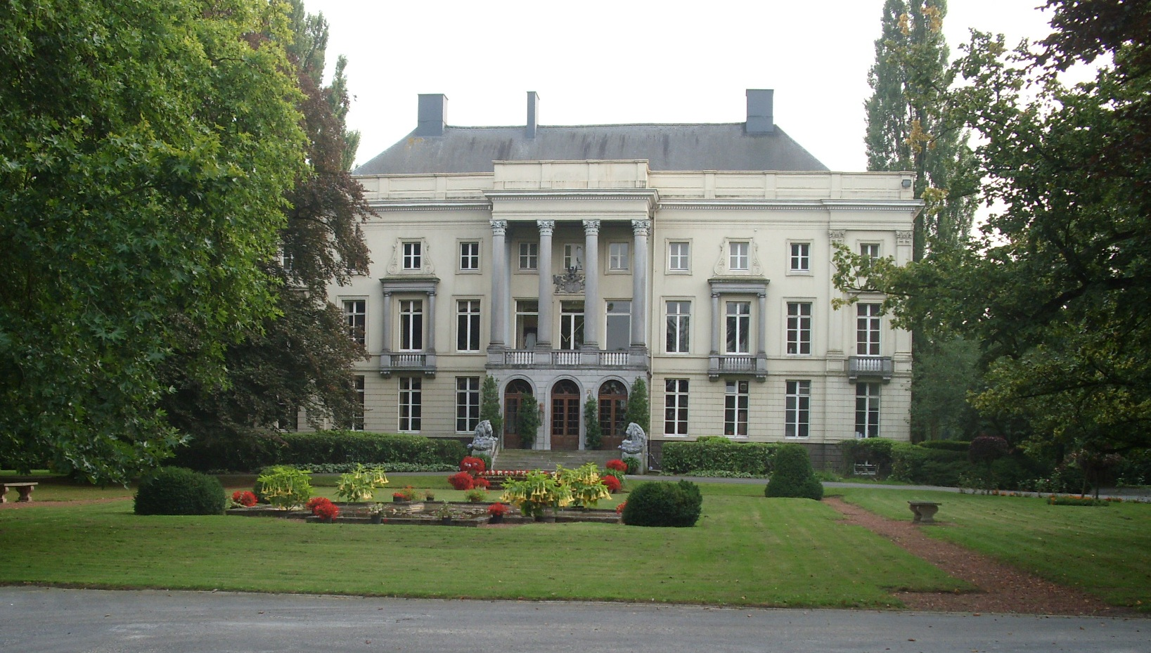 Kasteel Bellem - fusiegemeente Aalter - Oost-Vlaanderen - België